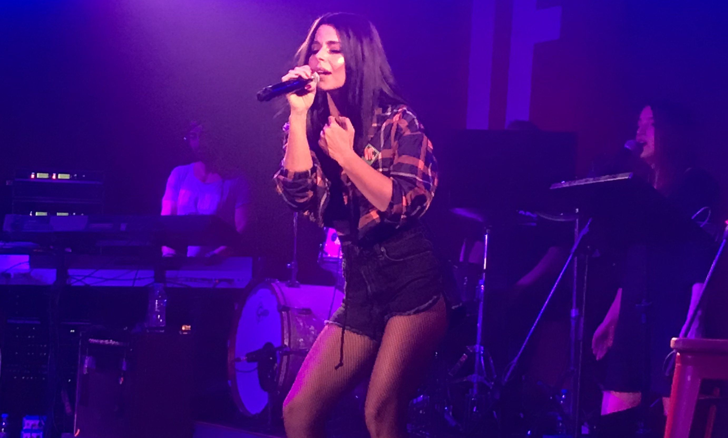 Türk şarkıcı Simge, IF Beşiktaş'ta "Yankı" şarkısını söylüyor.